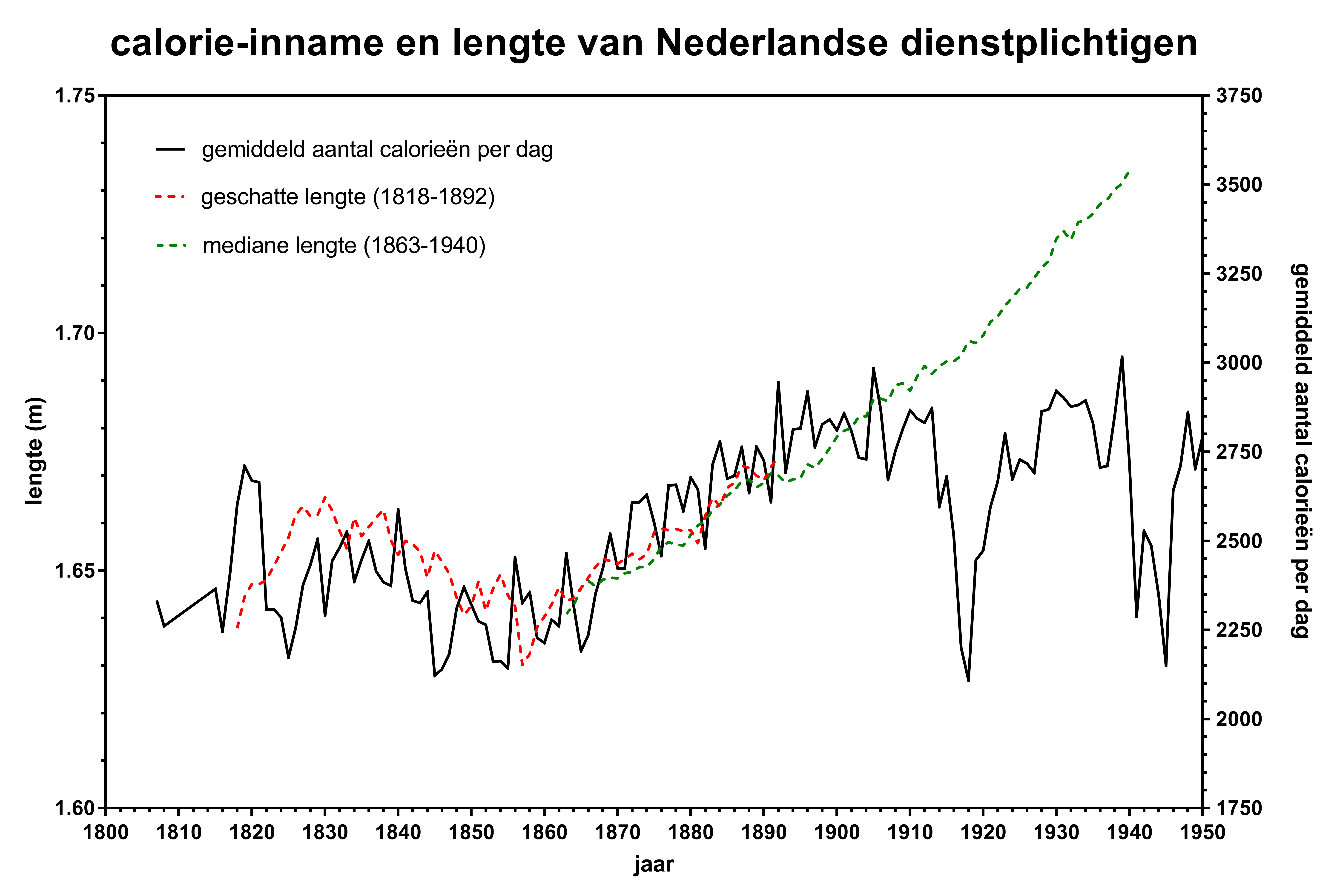 calorie/inname per dag en lengte van Nederlandse dienstplichtigen 18071950